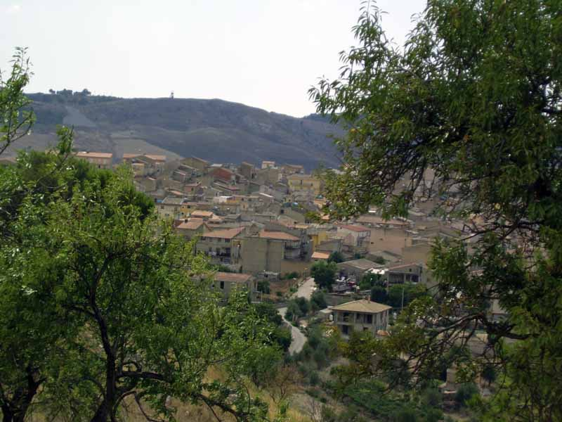 panorama di Montedoro dal Monte Ottavio